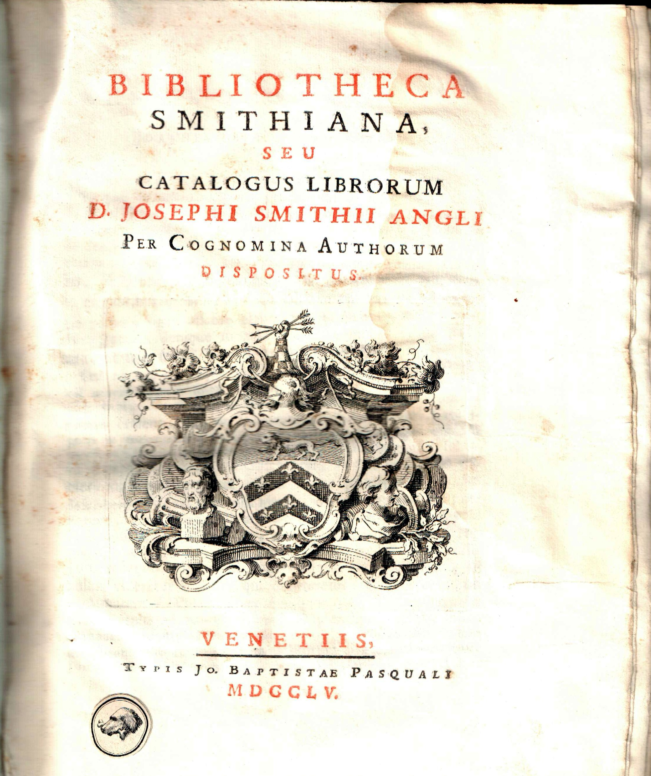 Page de garde du catalogue d'une bibliothèque du XVIII ème siècle.